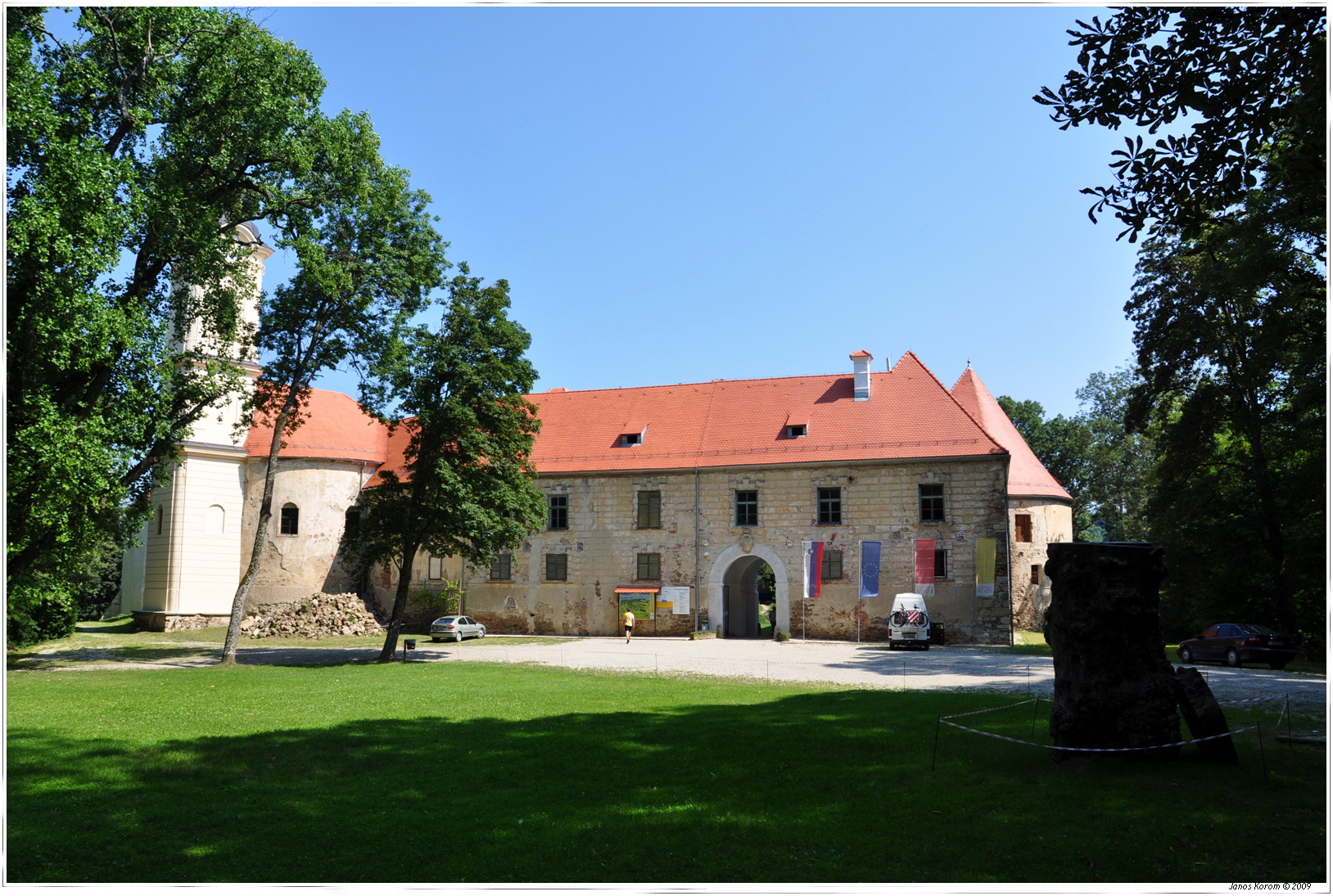 Grad na Gorickem